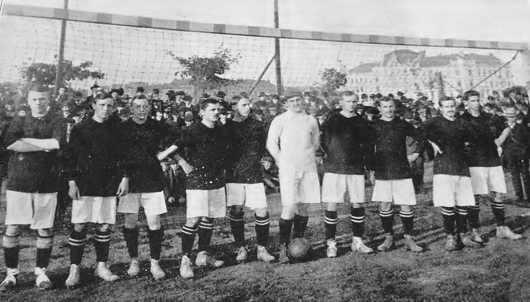 Team AC Sparta Praha